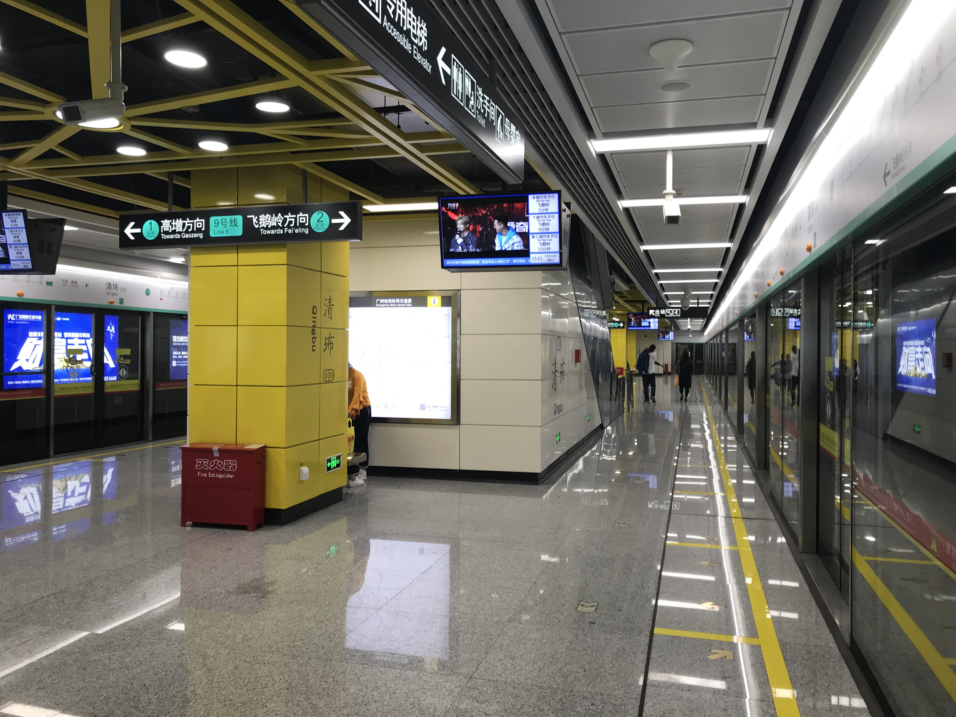 广州地铁清㘵站